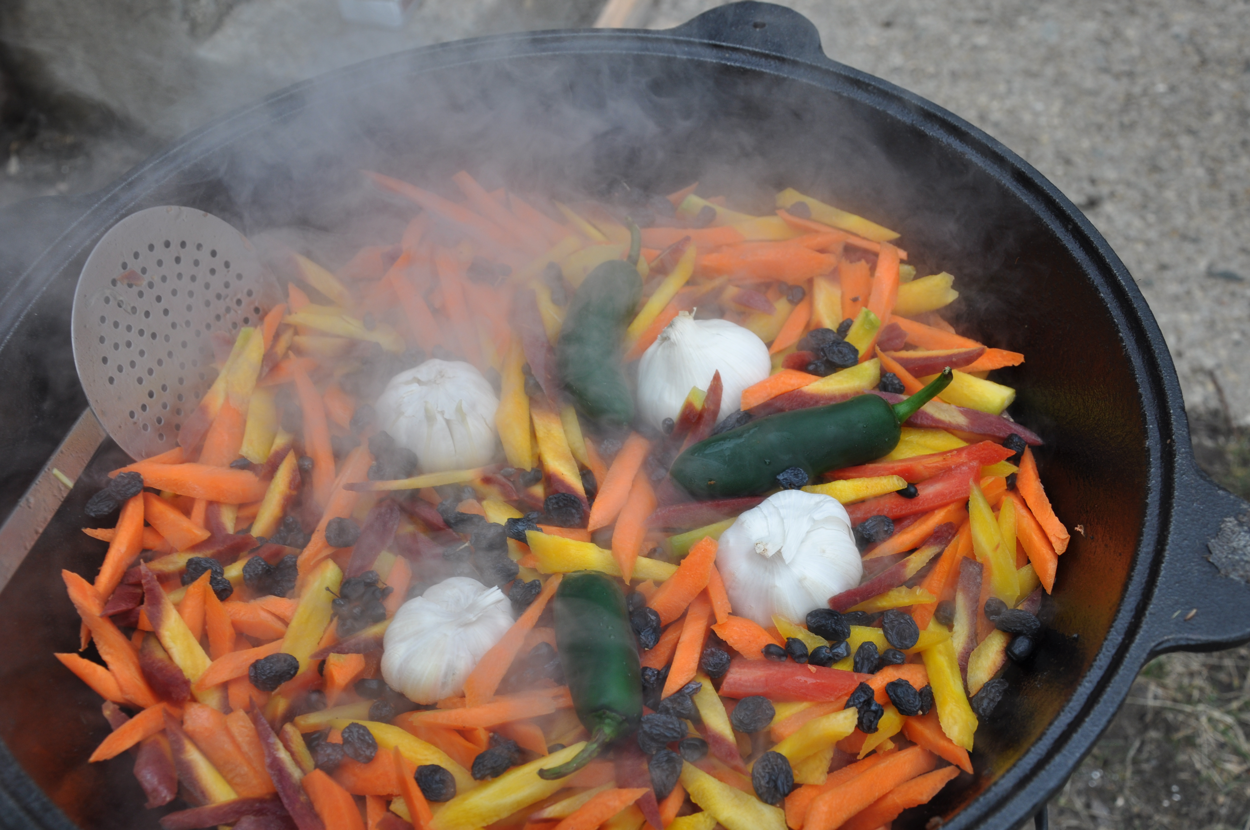 Плов в процессе готовки зирвака.